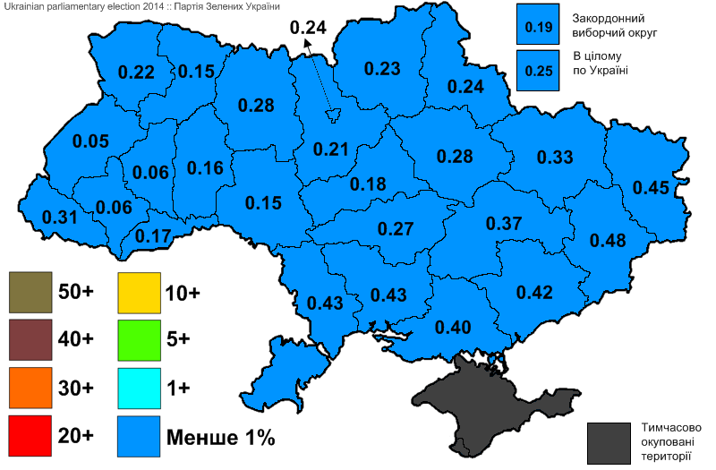 Результати виборів до Верховної Ради України, які відбулись 25 жовтня 2014 року. Інформація з офіційного сайту ЦВК. Партія Зелених України.